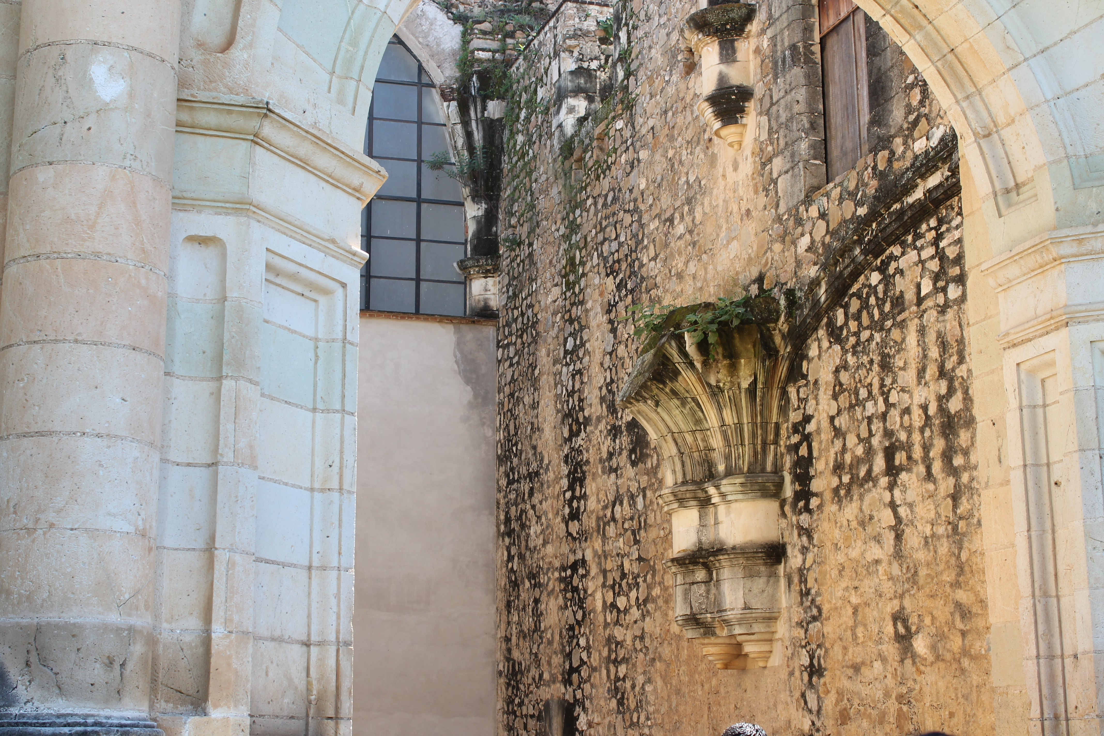 En la imagen se aprecia un capitel, mismo que fungió como base para un arco ubicado al interior del Ex Convento de Santiago Apóstol.